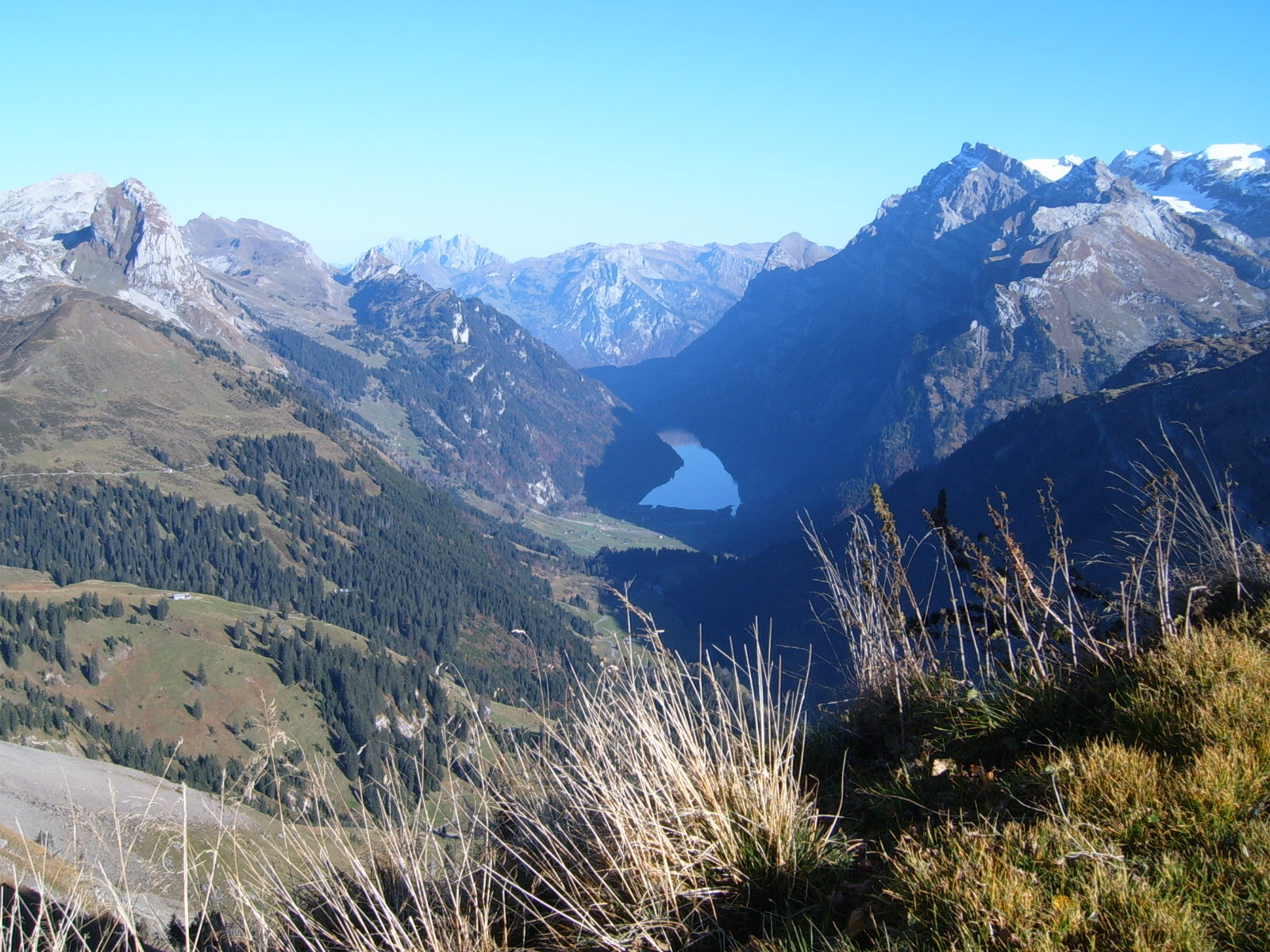 Klöntalersee and Glärnisch, seen from Saaspass (Switzerland) Photographer: Markus Bernet Date: 10/30/2005